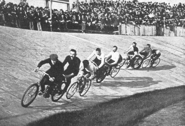 Rennen um das "Goldene Rad von Friedenau", v.l.nr. Emile Bouhours, Alfred Köcher, Edouard Taylor